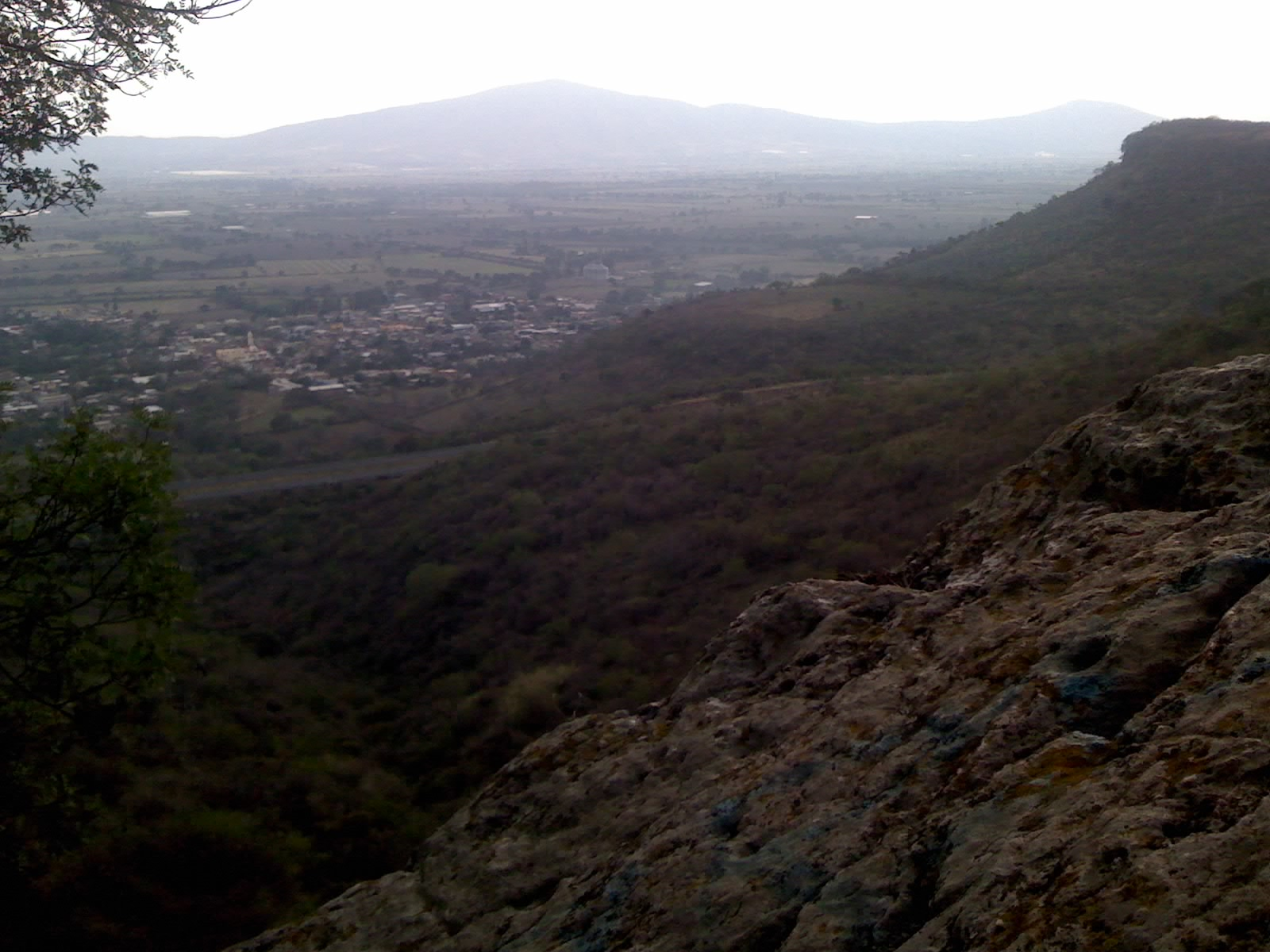 Mi pueblo visto desde "El Salto"